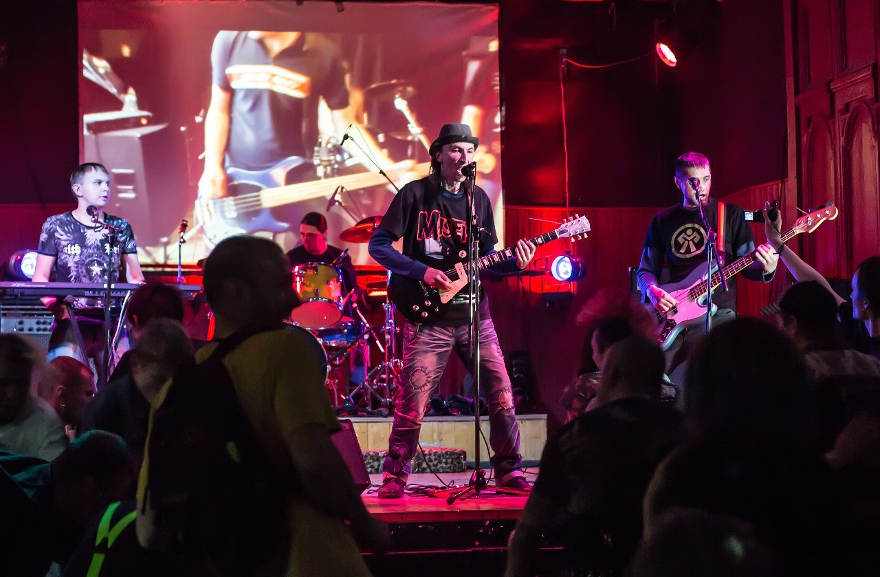 Группа Азъ. Санкт-Петербург. Панк слет им. Свина 2015г